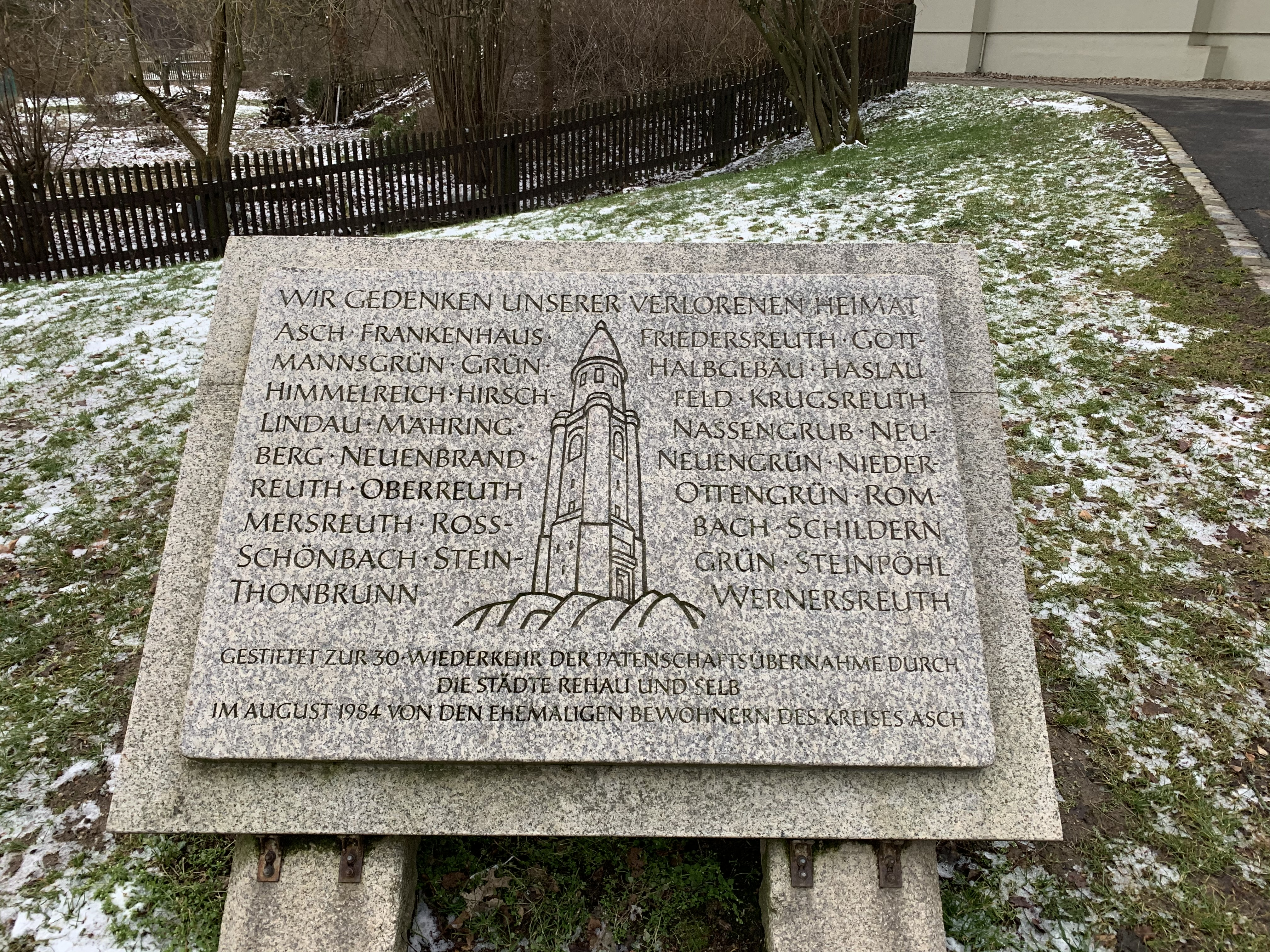 Der Park der Erinnerung ist eine Grünfläche mit Exponaten aus der Zeit des Kalten Krieges in Selb im Landkreis Wunsiedel in Bayern.